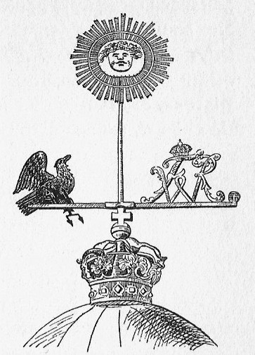 Turmspitze der Garnisonskirche in Potsdam